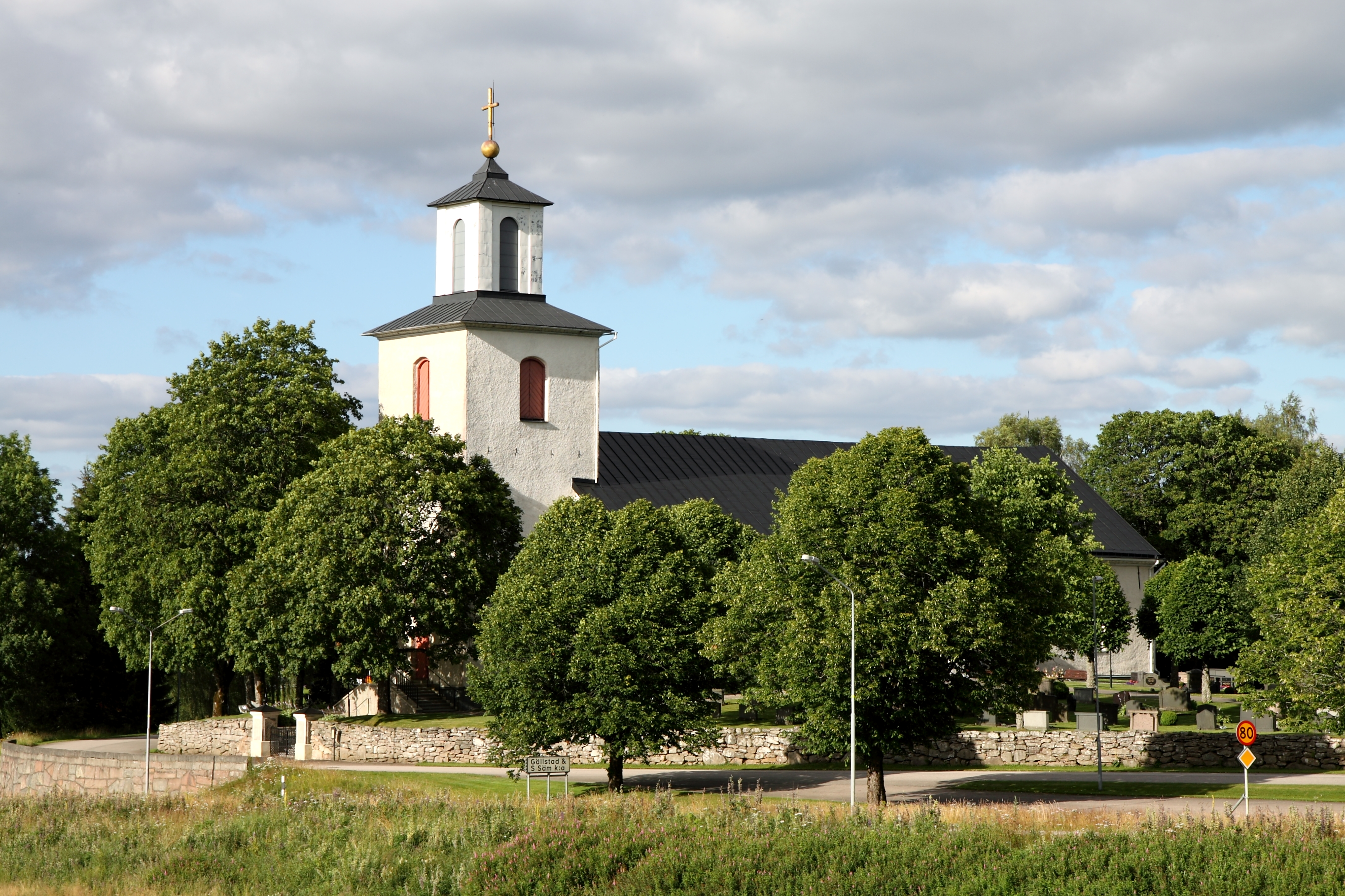 Gällstad och Södra Säms kyrka.